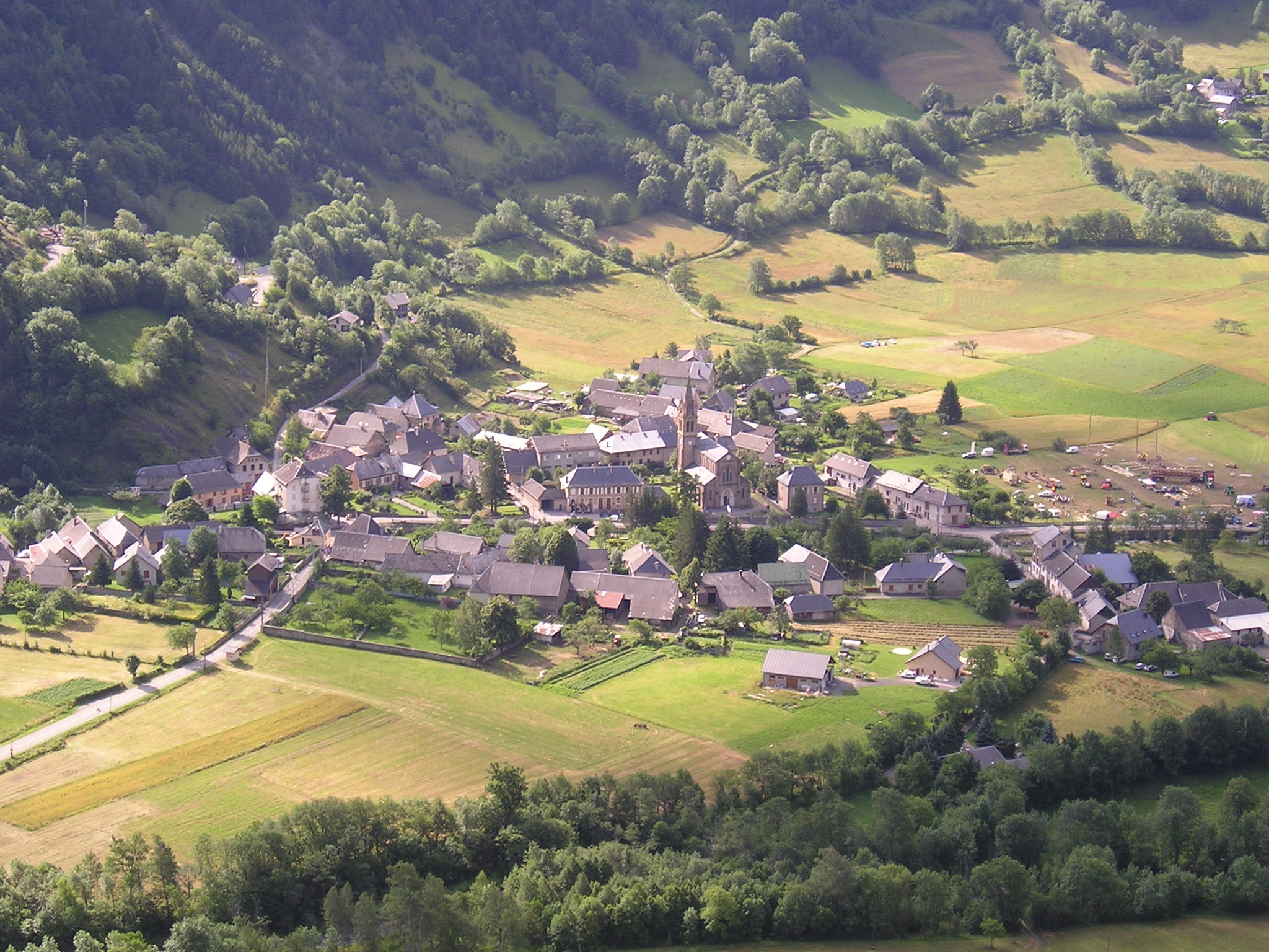 Le village du Périer (Isère) vu de Gaudissart